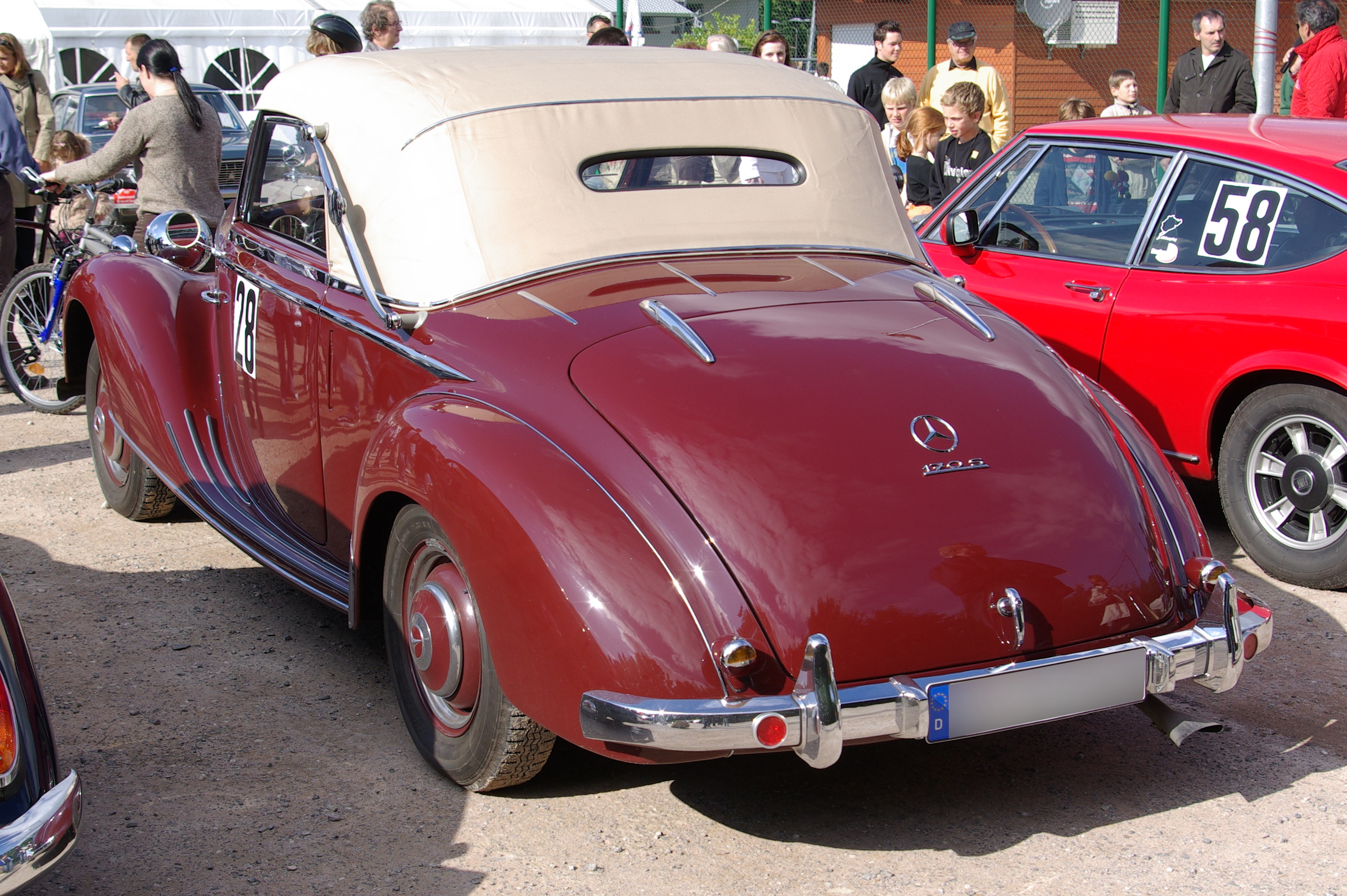 Mercedes Benz 170S W 136 Cabrio Baujahr 1951